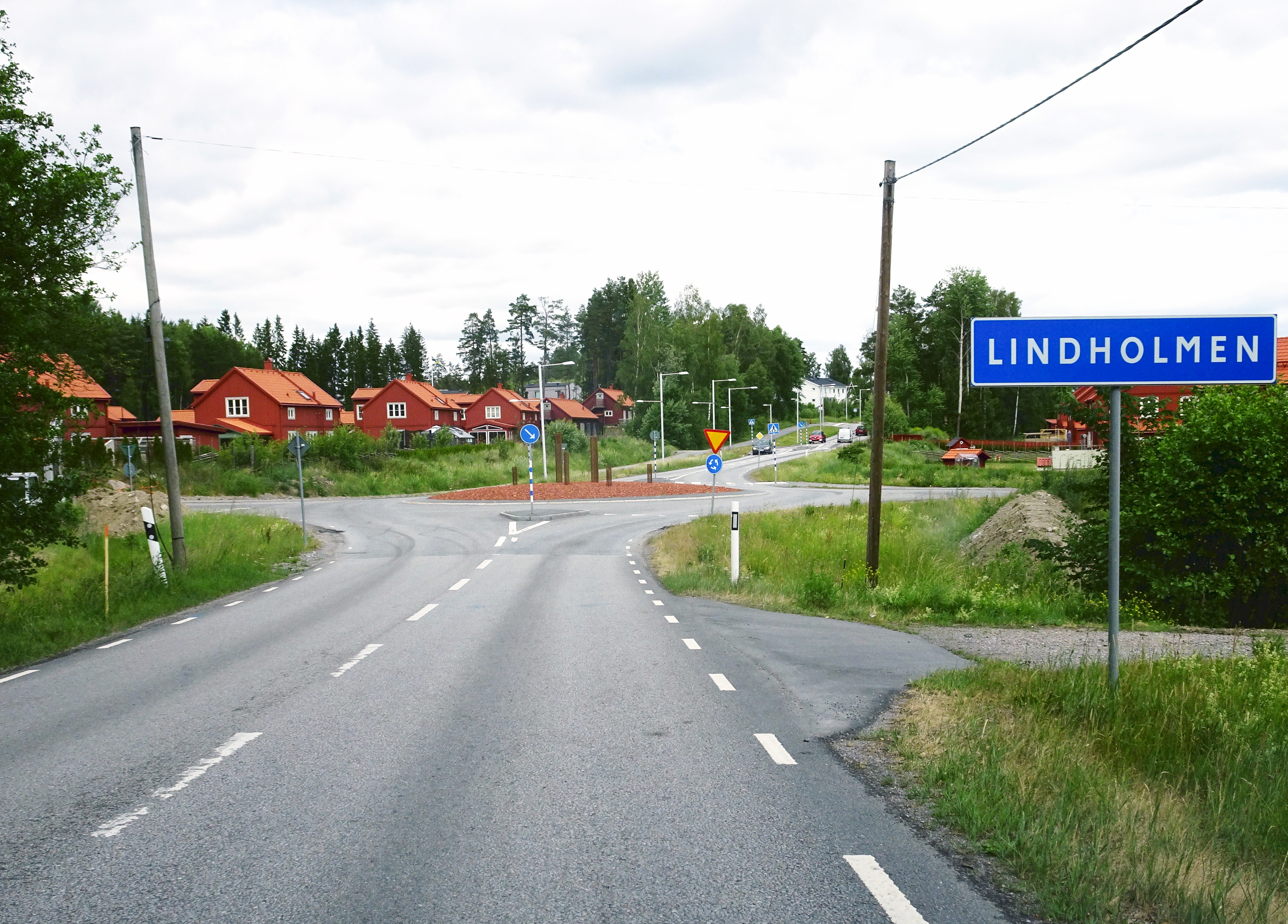 Lindholmen ortskylt